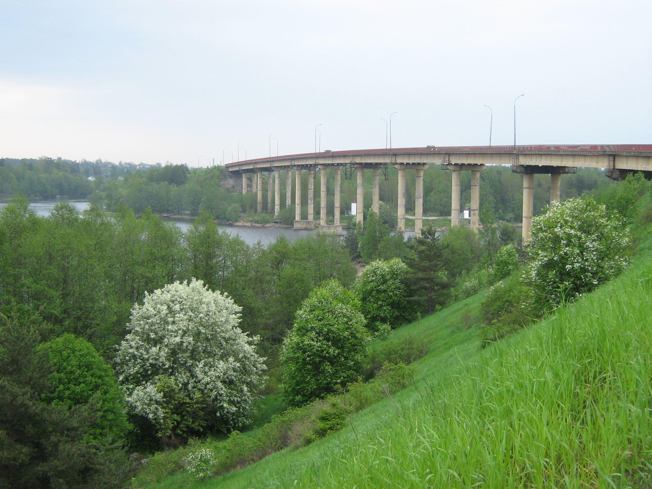 Kalininsky Bridge